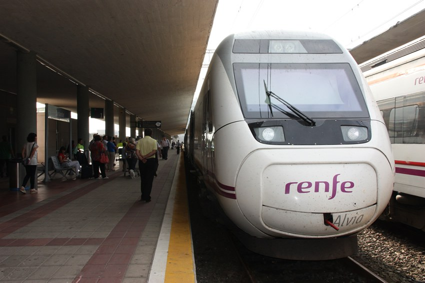 Un automotor eléctrico de la serie 120 de Renfe Operadora para servicios Alvia en la estación de Santander (Adif).